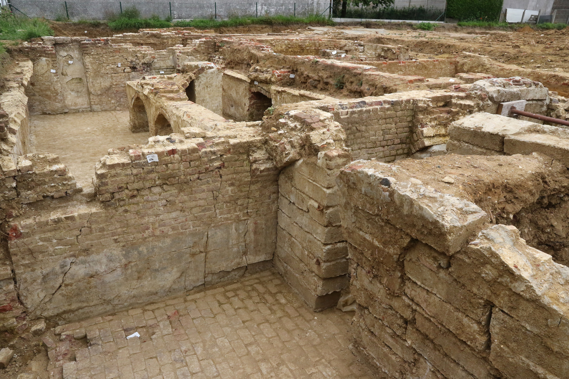 Ausgrabung der Höhe 80 in Wijtschate, Gebäudereste der Stellung